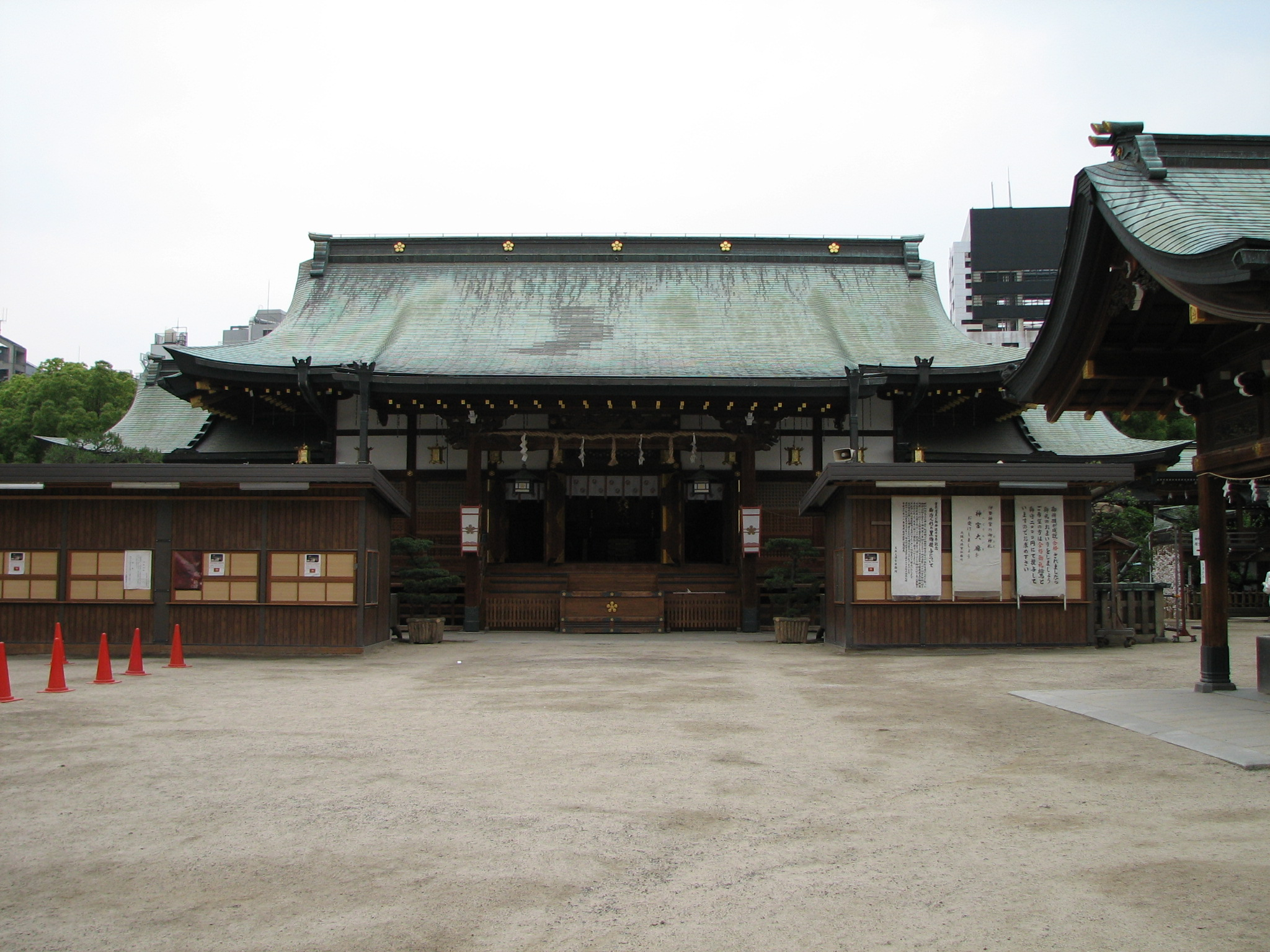 The haiden of Ōsaka Temman-Gū, Kita, Ōsaka, Japan 大阪天満宮（大阪市北区）拝殿